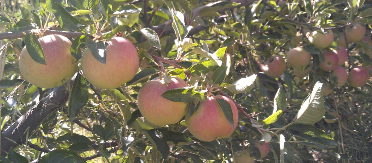 سیب گهواره تابستان 1393